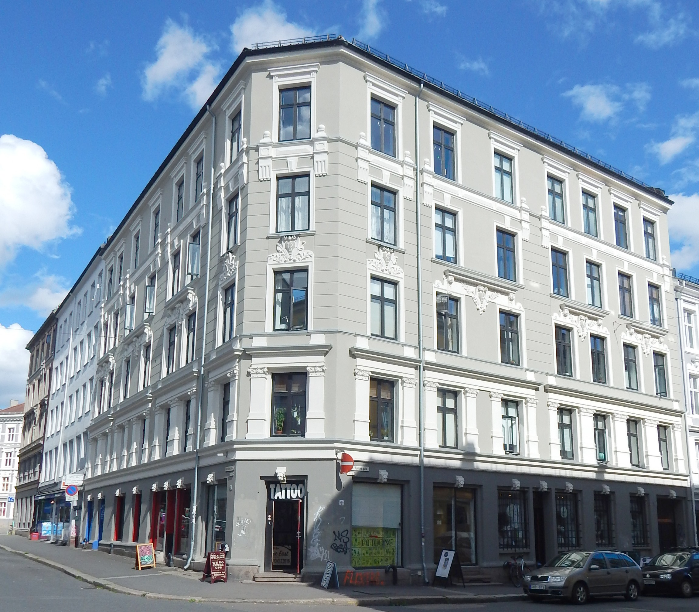 Rathkes gate 7. Arkitekt: Matheus Mosgaard (1897–98). Liesteført hos Byantikvaren i Oslo